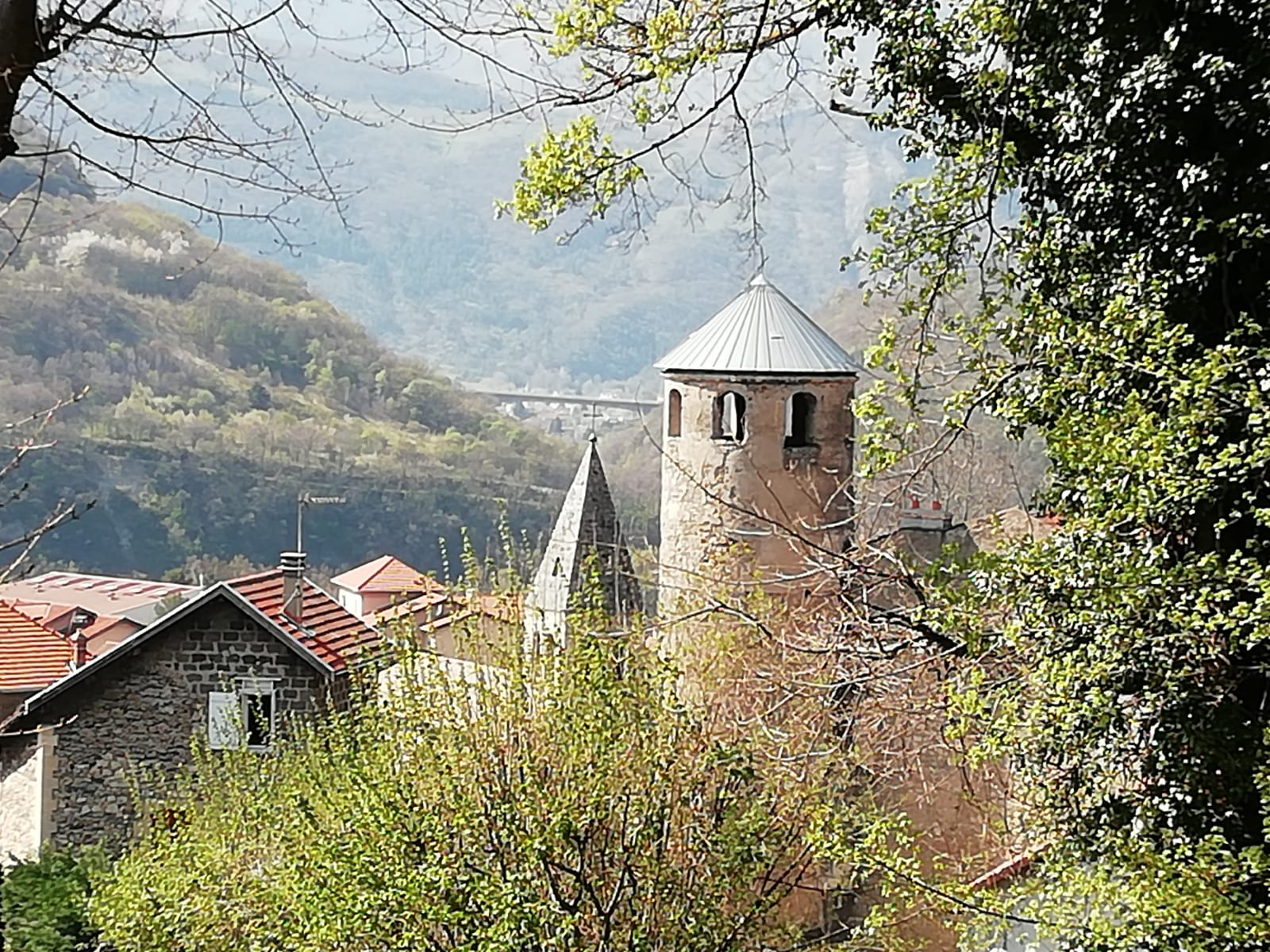 Tour de Saint Georges de Commiers, habitée aujourd'hui